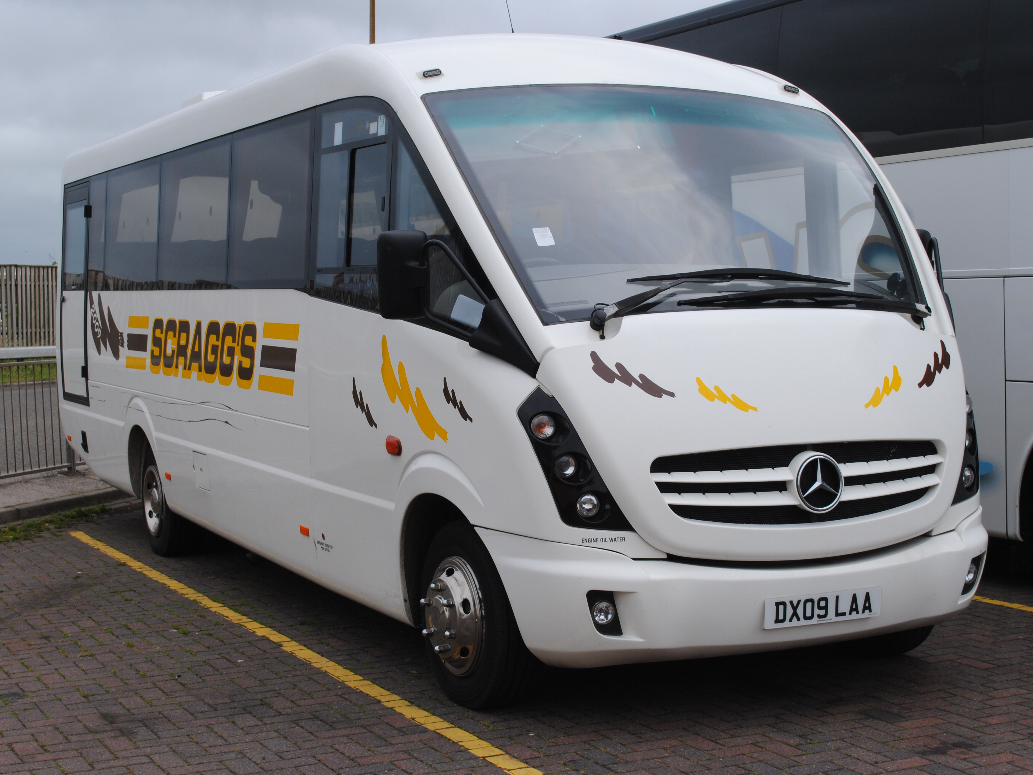 Mercedes-Benz 0.816D Plaxton Cheetah